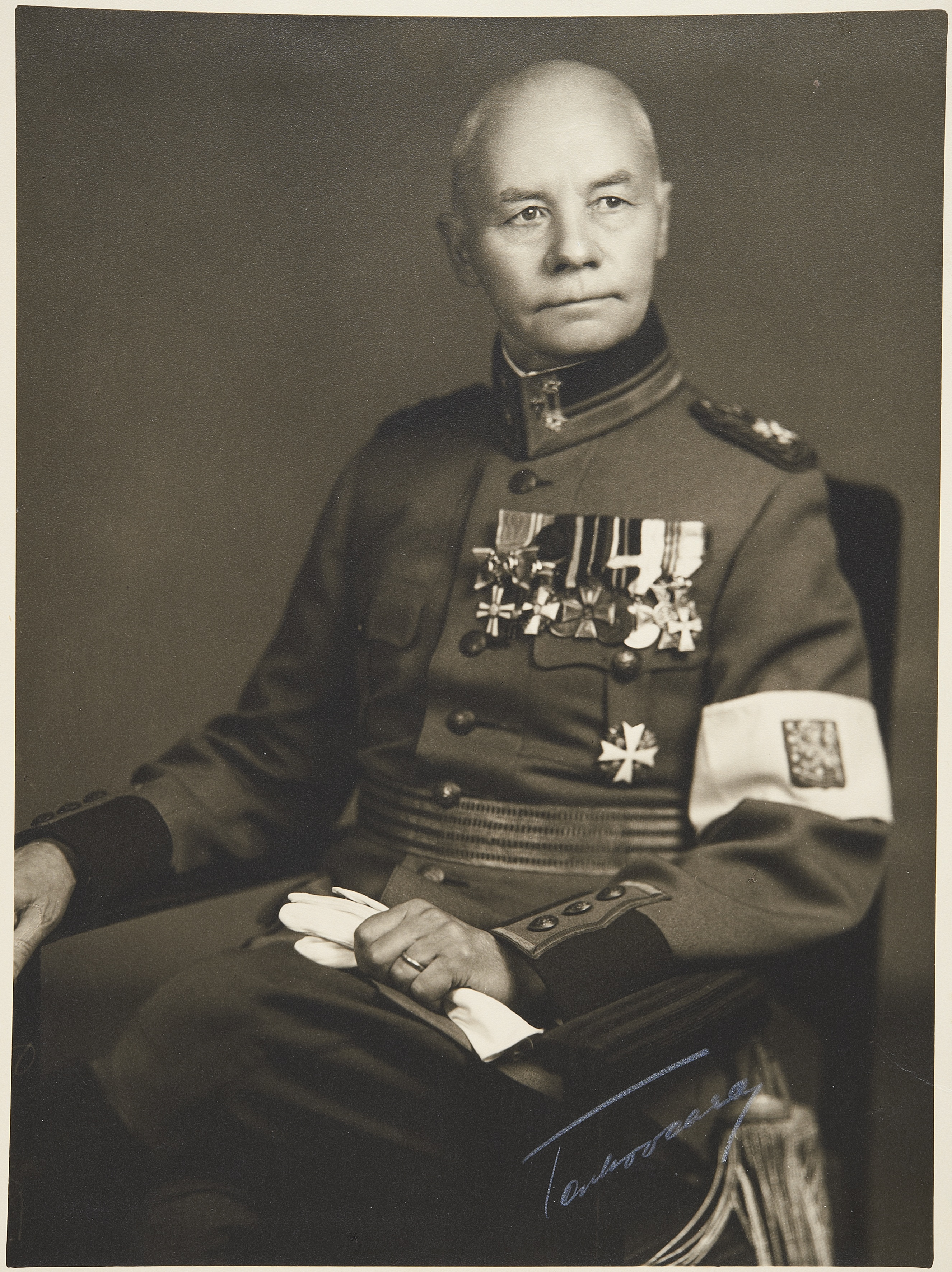 Puolustuslaitoksen ylikapellimestari, musiikkieverstiluutnantti Lauri Näre